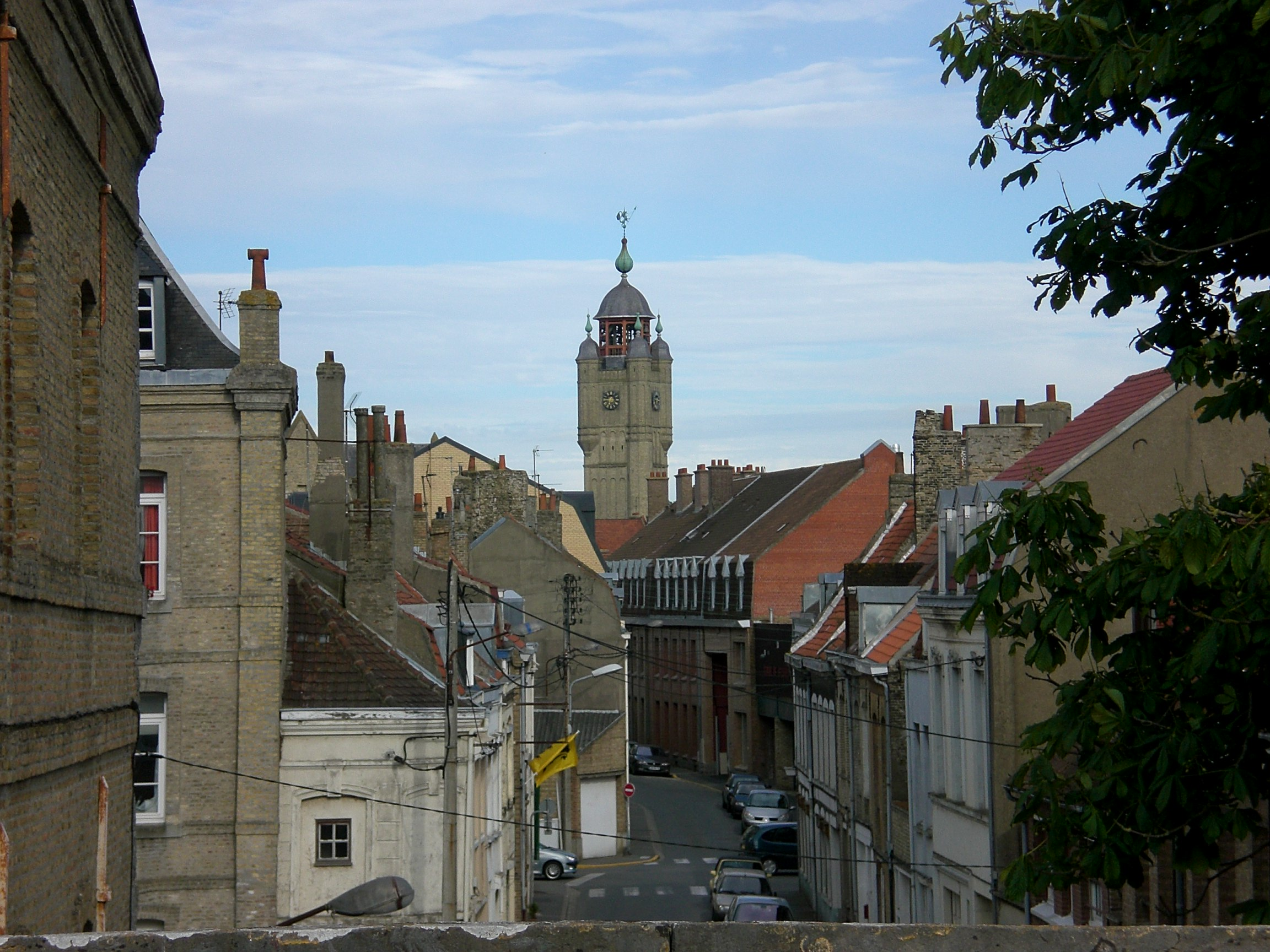 Vue d'un rempart de la ville de Bergues avec le Beffroi qui culmine sur la ville.